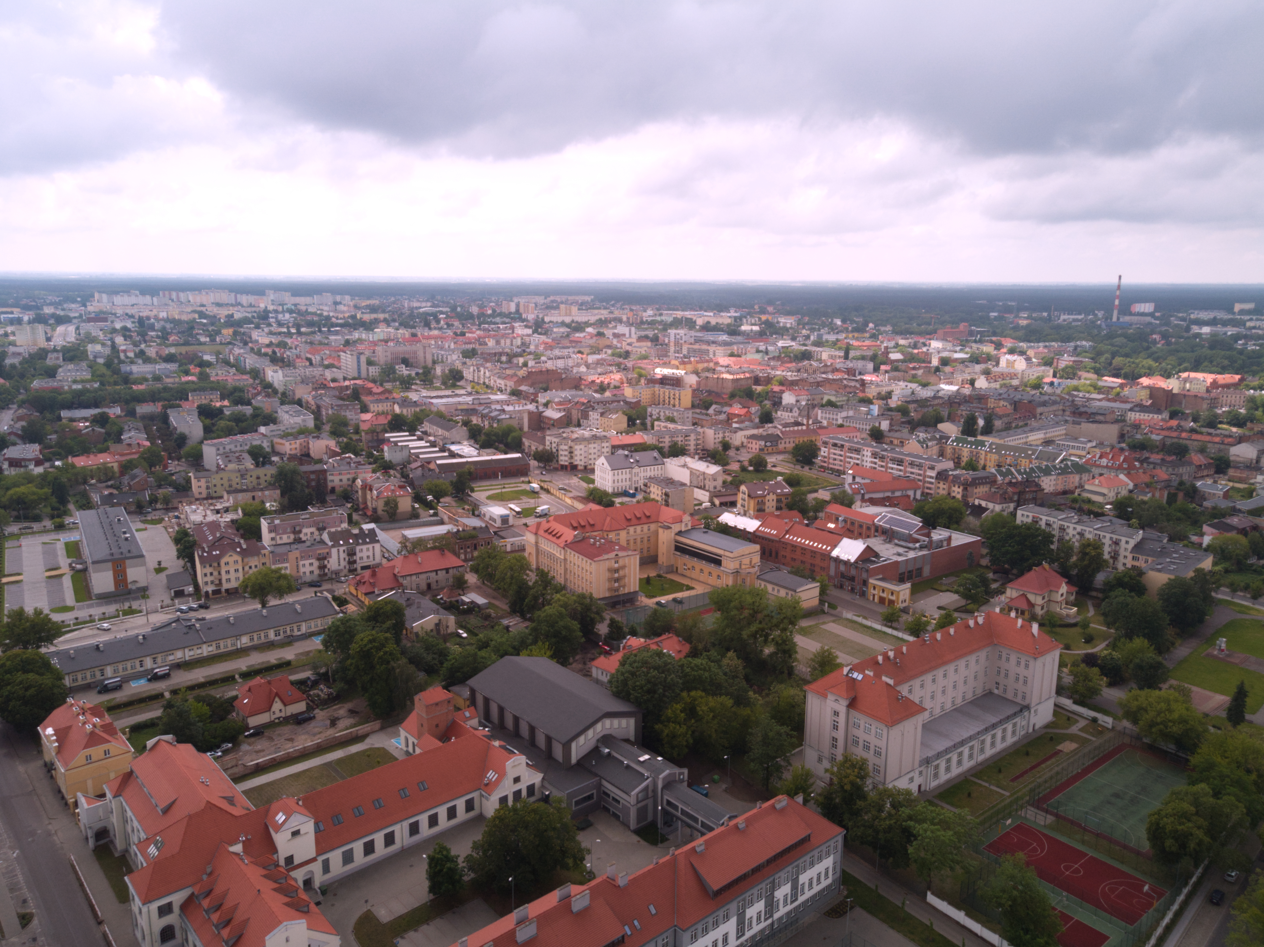 Wloclawek_dron_01_04072020